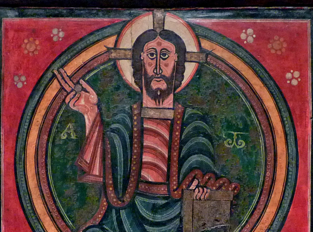 Detall del Frontal de altar d'Ix procedent de La Guingueta d'Ix (Alta Cerdanya) conservat en el Museu Nacional d'Art de Catalunya (Barcelona) Siglo XII From the romanesque collections of the National Art Museum of Catalonia, inventory number: (official description)The item in the museum is in the public domain as described below. The copyright status of the photograph of the item is indicated separately. This work is in the public domain in its country of origin and other countries and areas where the copyright term is the author's life plus 100 years or less. You must also include a United States public domain tag to indicate why this work is in the public domain in the United States. This file has been identified as being free of known restrictions under copyright law, including all related and neighboring rights.